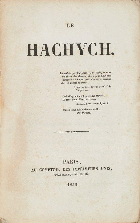 Cover